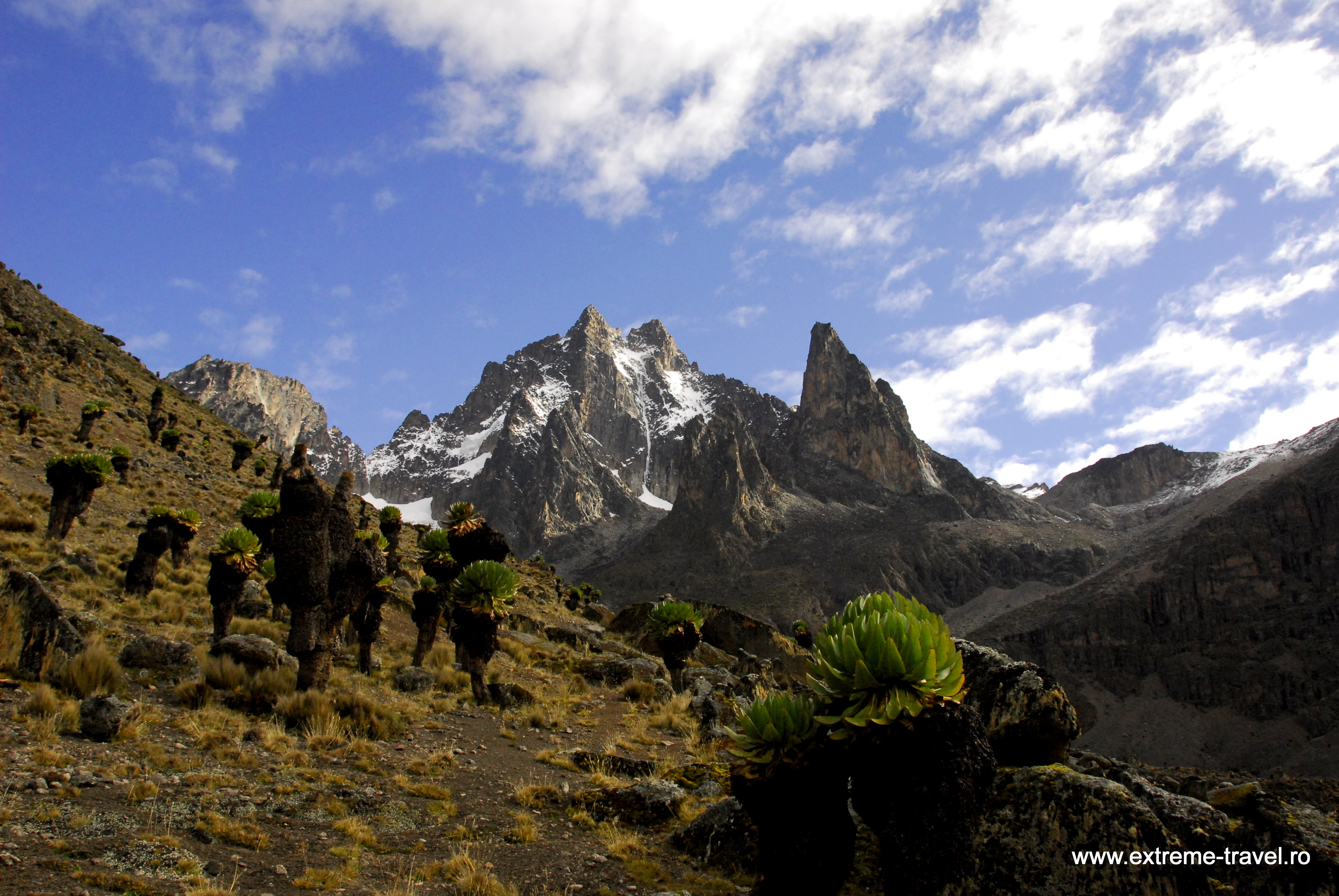 Mount Kenya